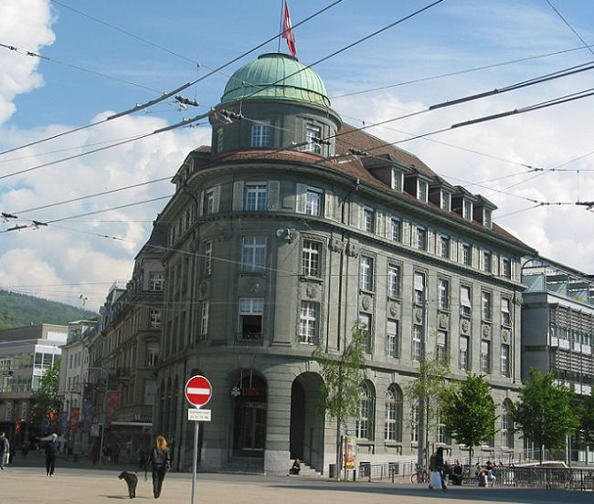 take by me in 2004